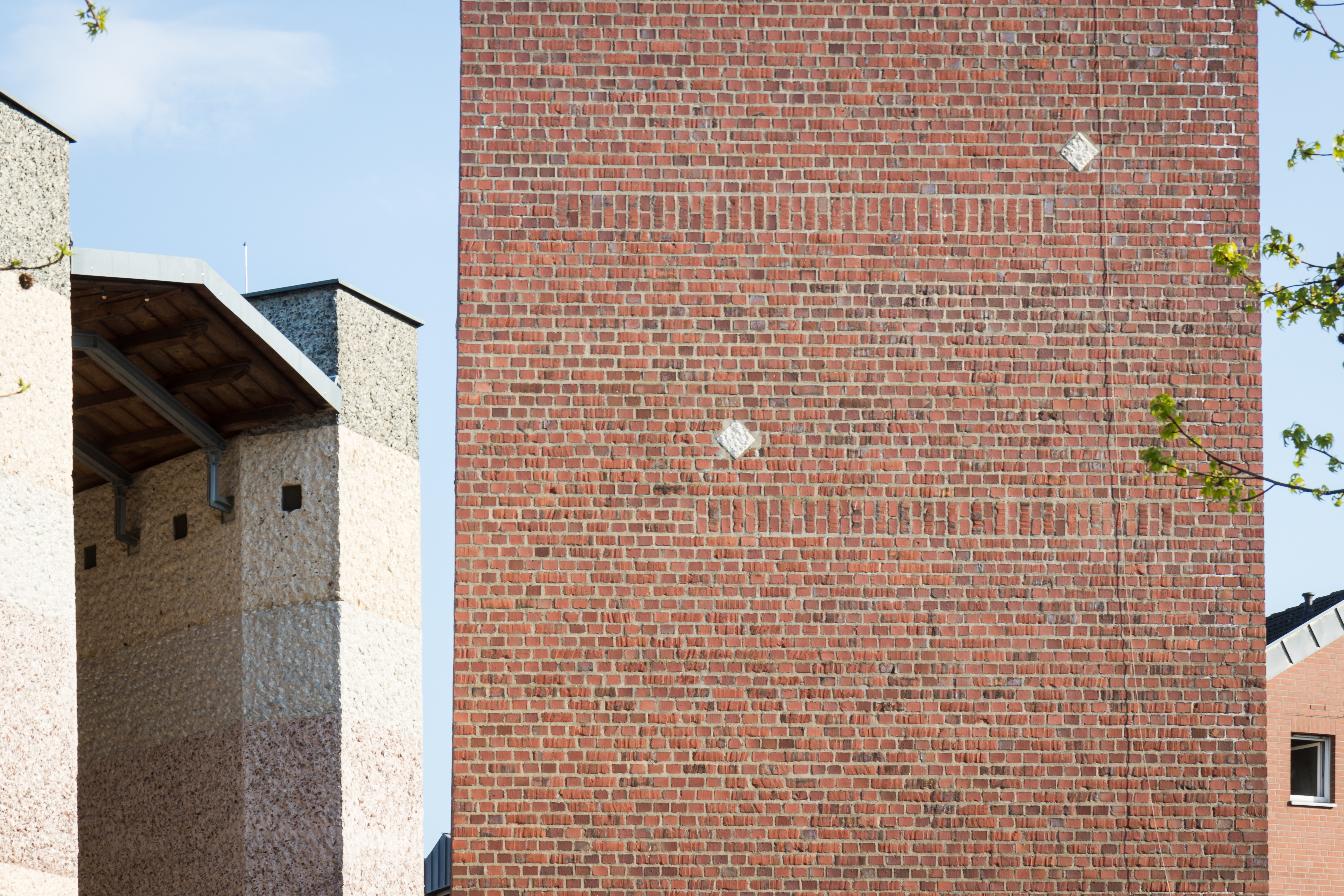 Katharina von Siena, Köln-Blumenberg. Architekten: Heinz und Nikolaus Bienefeld